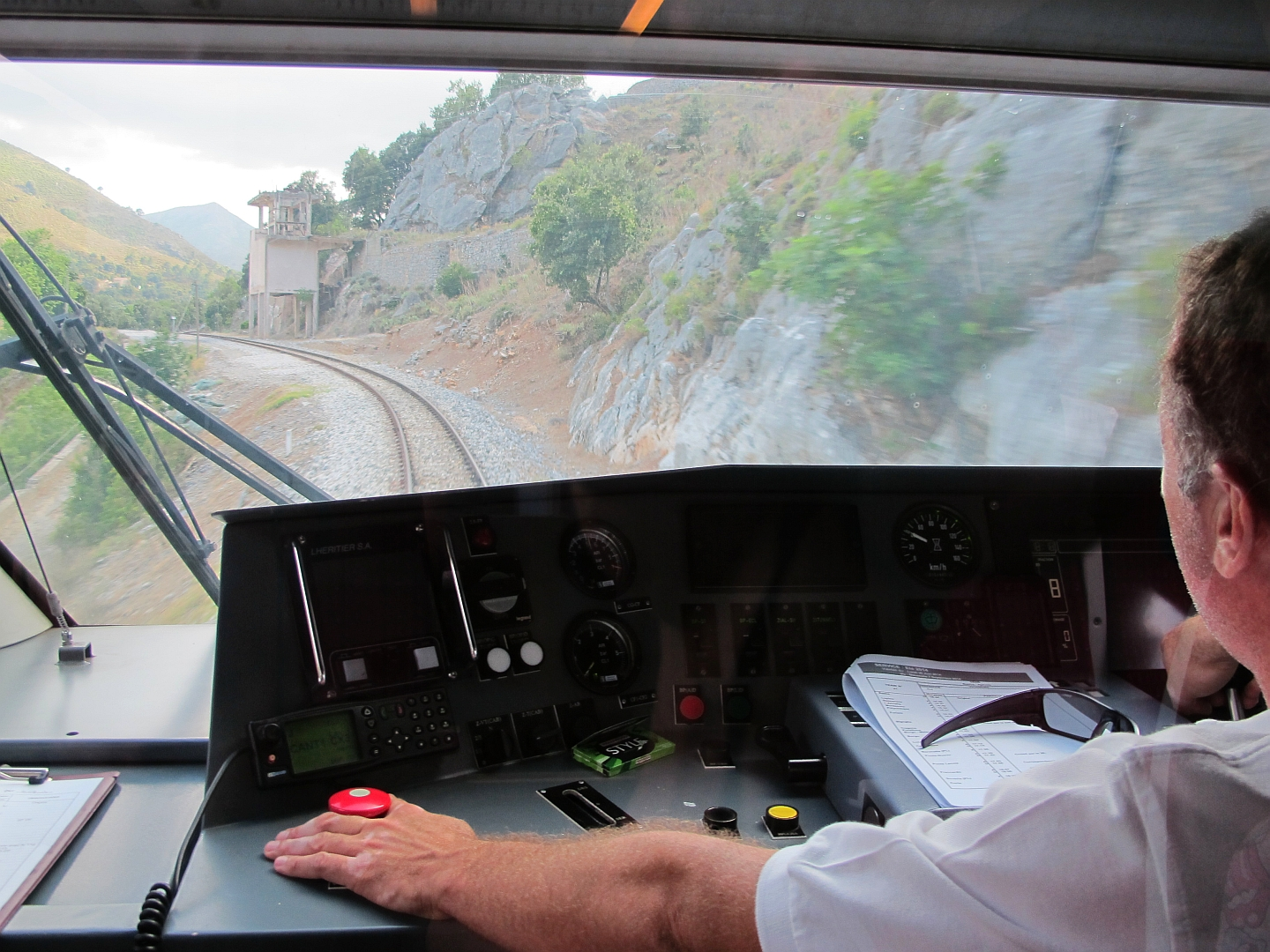 Poste de conduite de l'autorail AMG-805 des chemins de fer de la Corse